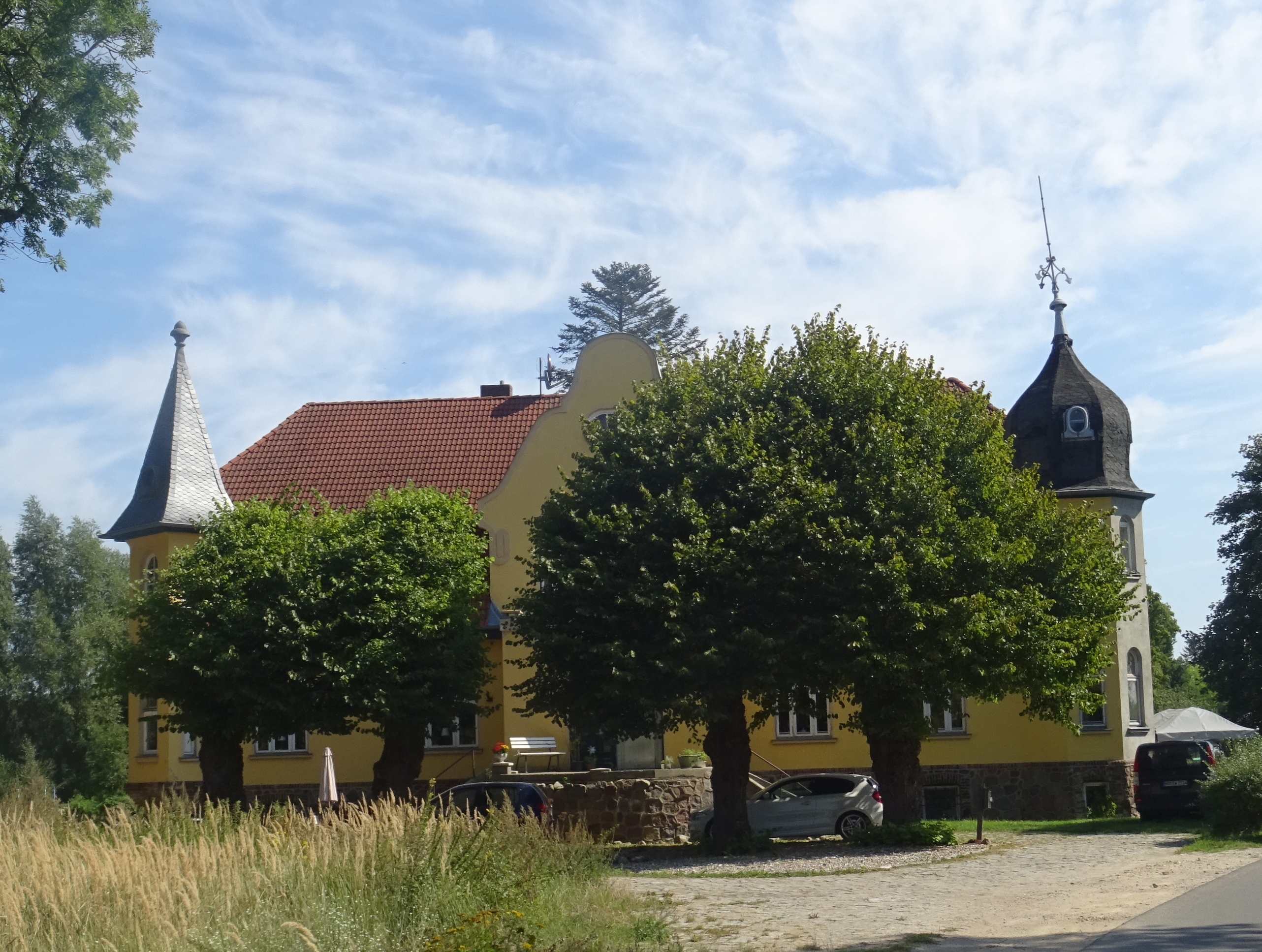 Öftenhäven, Gemeinde Broderstof, denkmalgeschütztes Gutshaus.